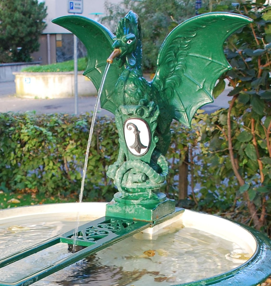 Basilisk an einem Basler Brunnen